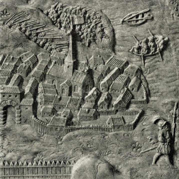 Oslo i 1567. Detalj fra et relieff på kong Frederik IIs sarkofag i Roskilde Domkirke som forestiller svenskenes beleiring av Oslo.